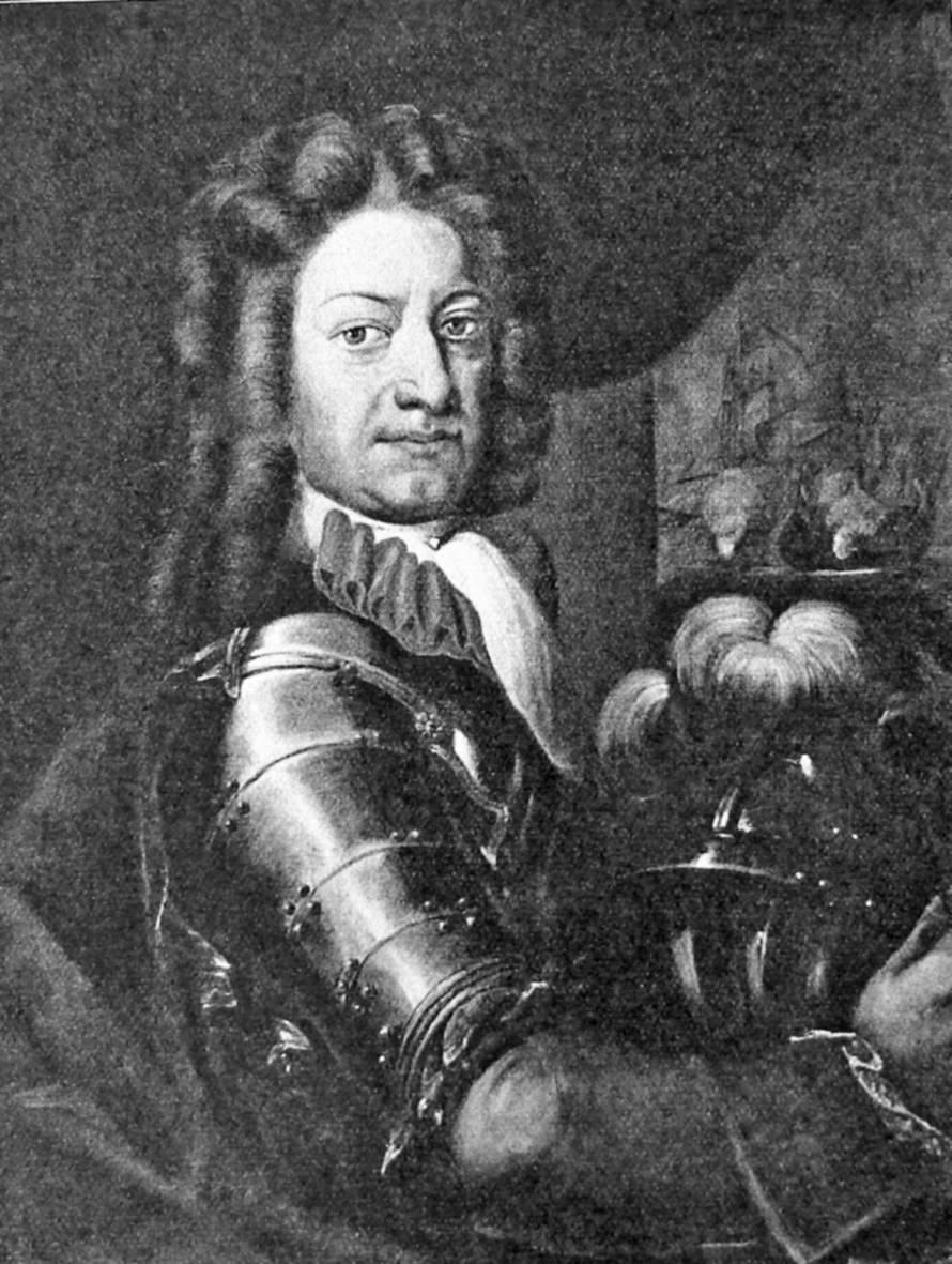 Ivar Huitfeldt født 5. december 1665 på Frederikssten i Norge . Død 4. oktober 1710. Var en dansk/norsk søhelt